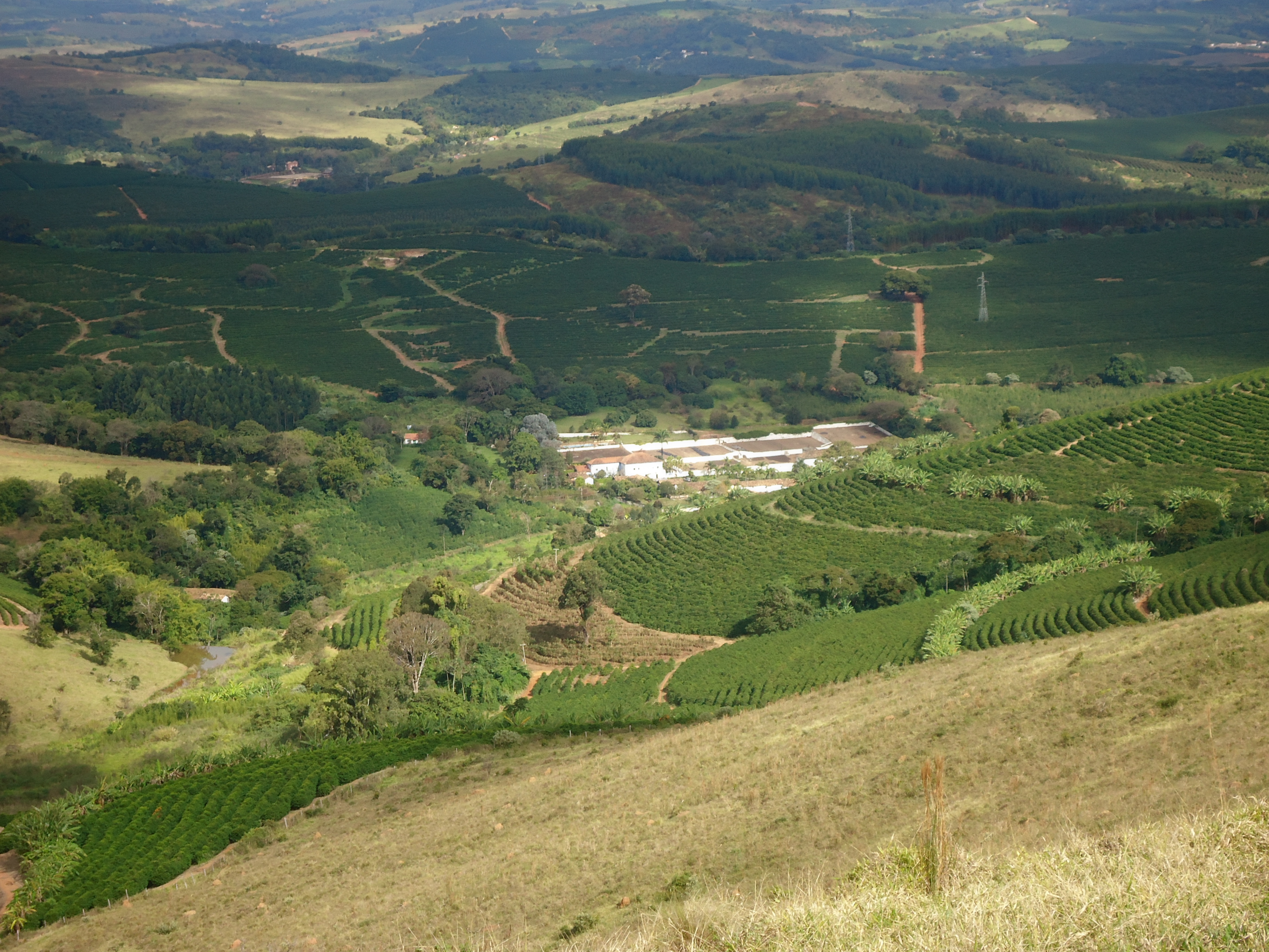 Esta foto mostra uma visão geral dos cafezais do município. Ao centro está o hotel fazenda pedra negra.